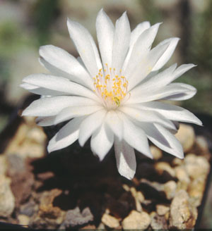 Mammillaria albiflora aus der Sammlung von „Andreae Kakteenkulturen“, Inh. Michael Januschkowetz, Ausserhalb Lengfeld 17, 64853 Otzberg-Lengfeld